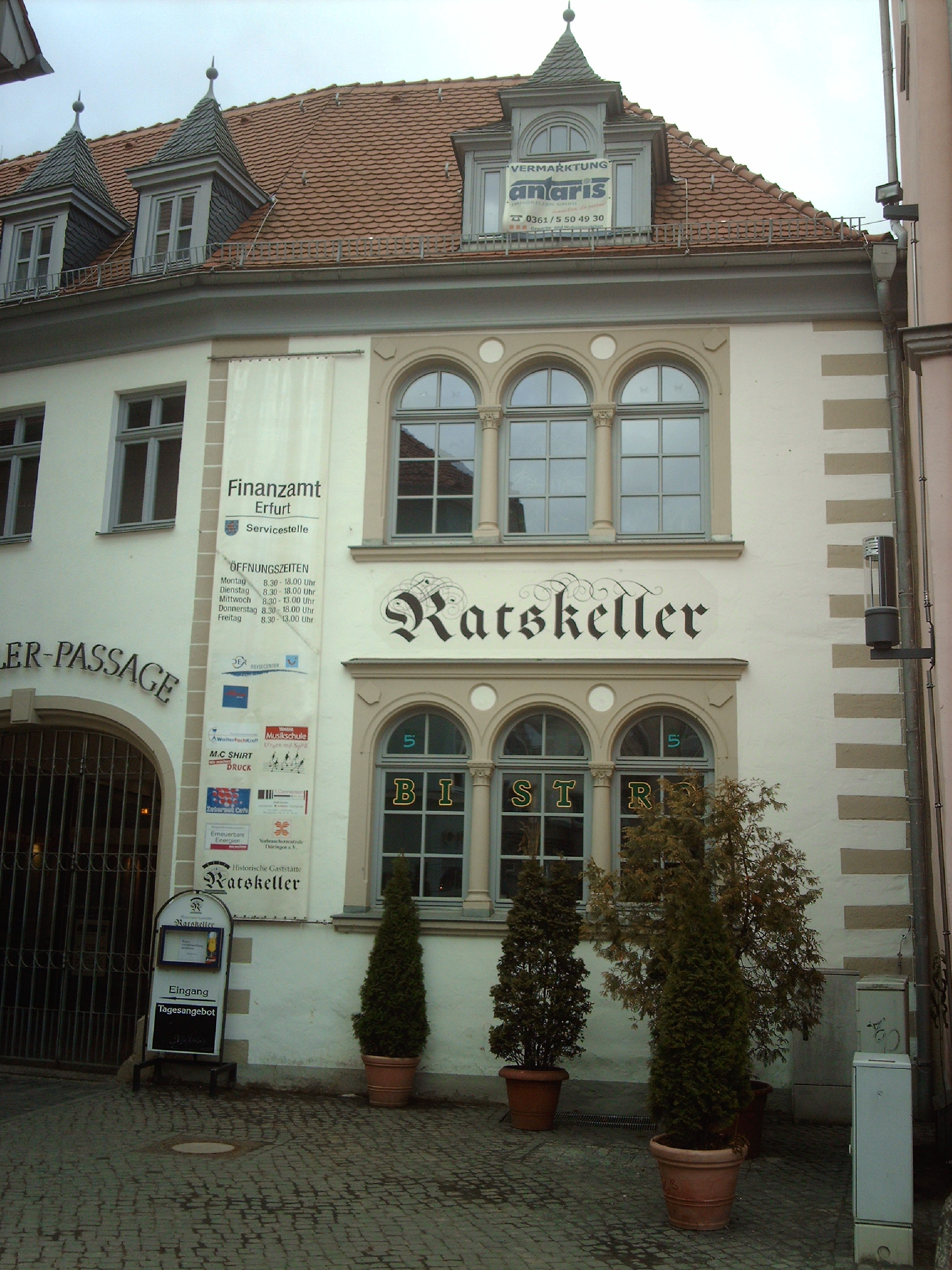 Der Ratskeller samt Passage am Erfurter Fischmarkt 5.